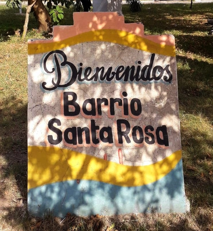 Bienvenidos a Santa Rosa